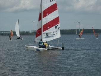 Segelkatamaran selbst erstelltes Foto von Ingo Dombrowski, Seelze, Deutschland, Mai 2003